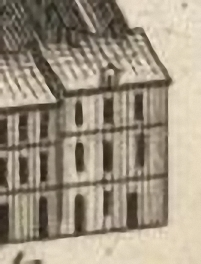 14, rue de Braque en 1739. Extrait du plan de Paris dit "Plan de Turgot"; levé et dessiné par Louis Bretez, gravé par Claude Lucas, 1739